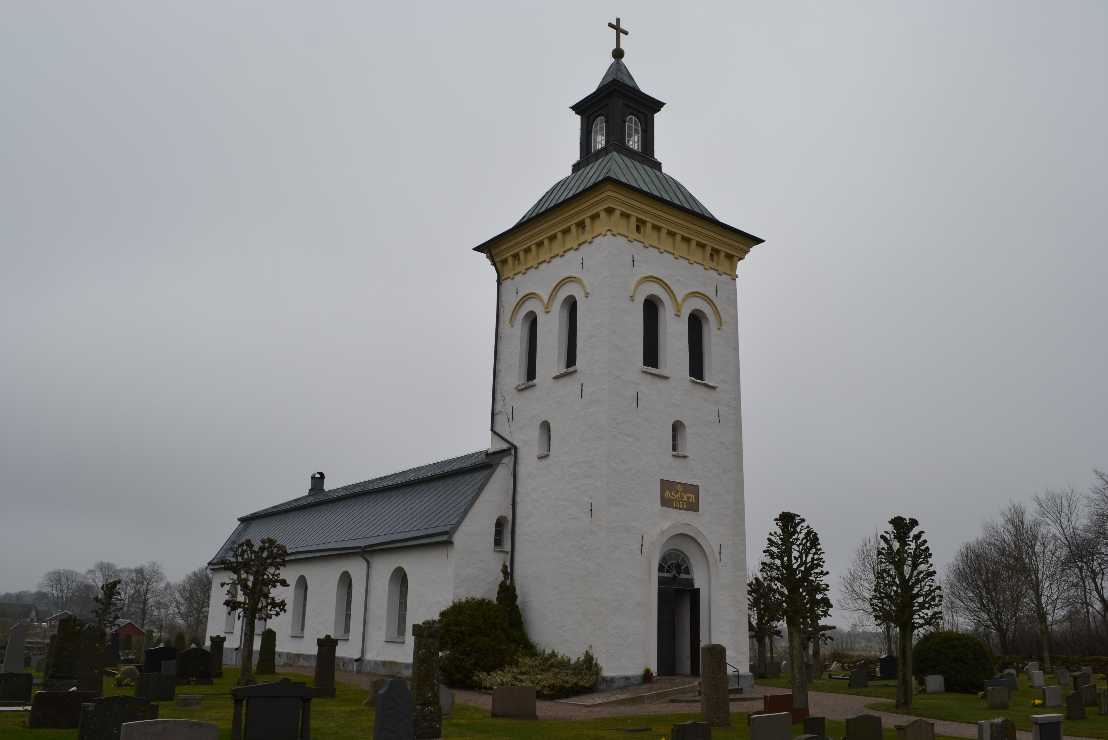 Spannarps kyrka, Halland.